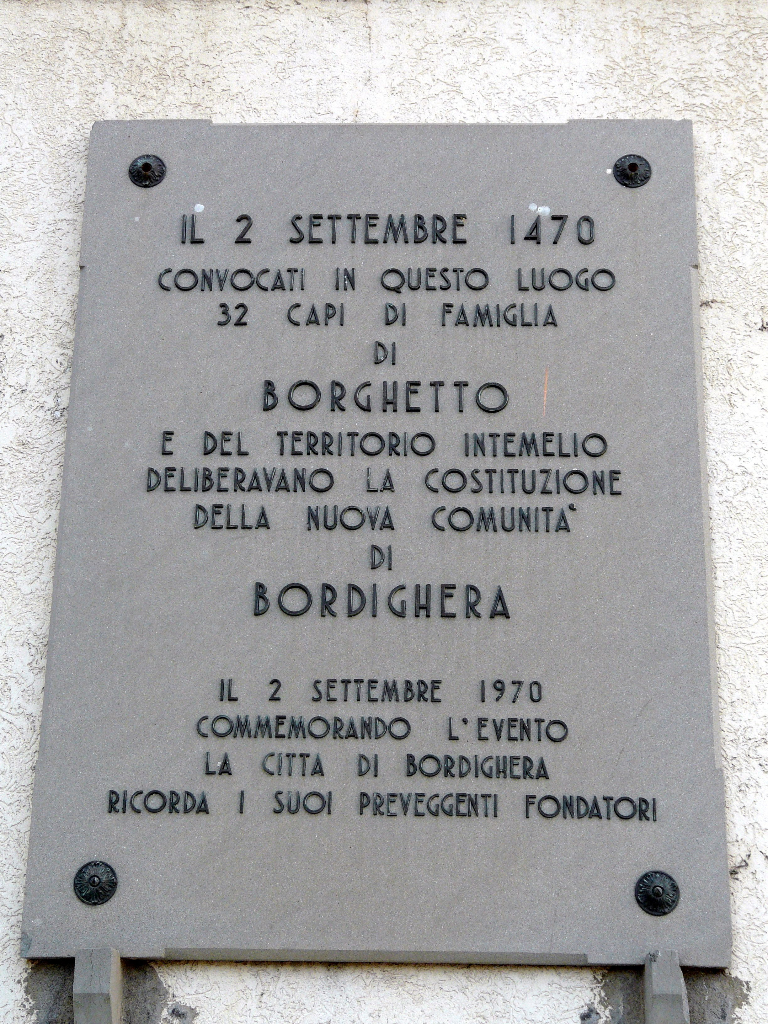 Targa a memoria della costituzione della "Comunità di Bordighera" del 1470, Borghetto San Nicolò, Bordighera, Liguria, Italia